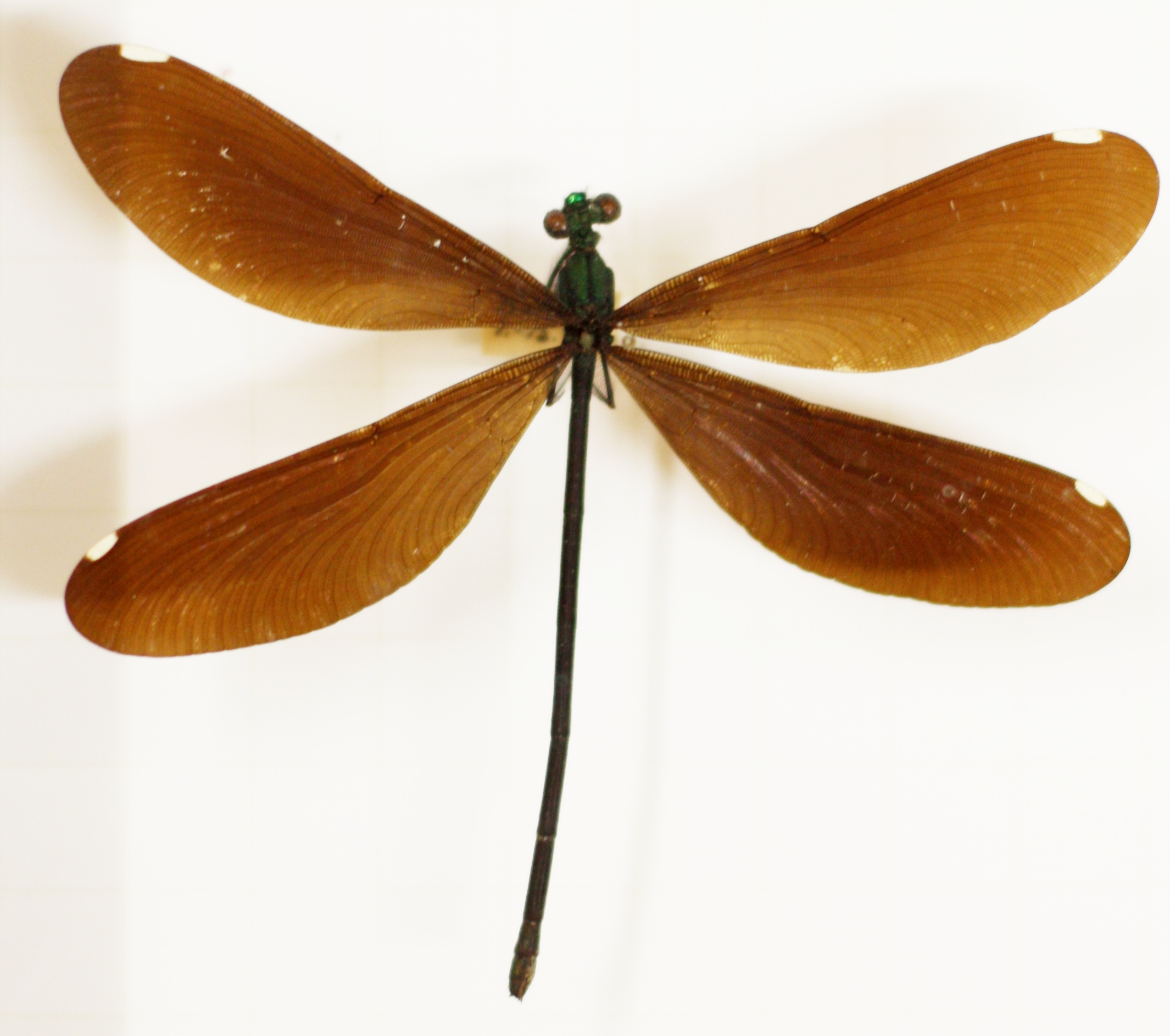 Naturkundliche Sammlung Übermaxx Überseenuseum Bremen; Schmetterlinge und andere